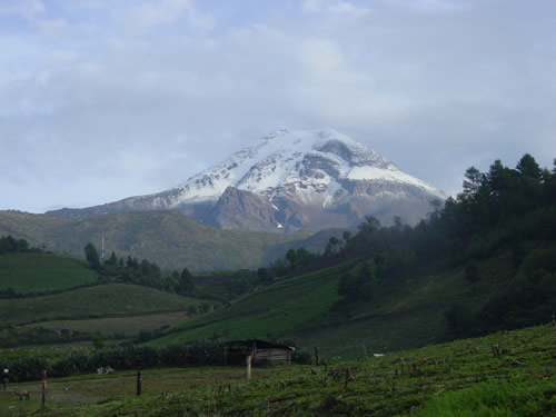 citlaltepetl (copyright Jan Schreurs Nijmegen 2003)